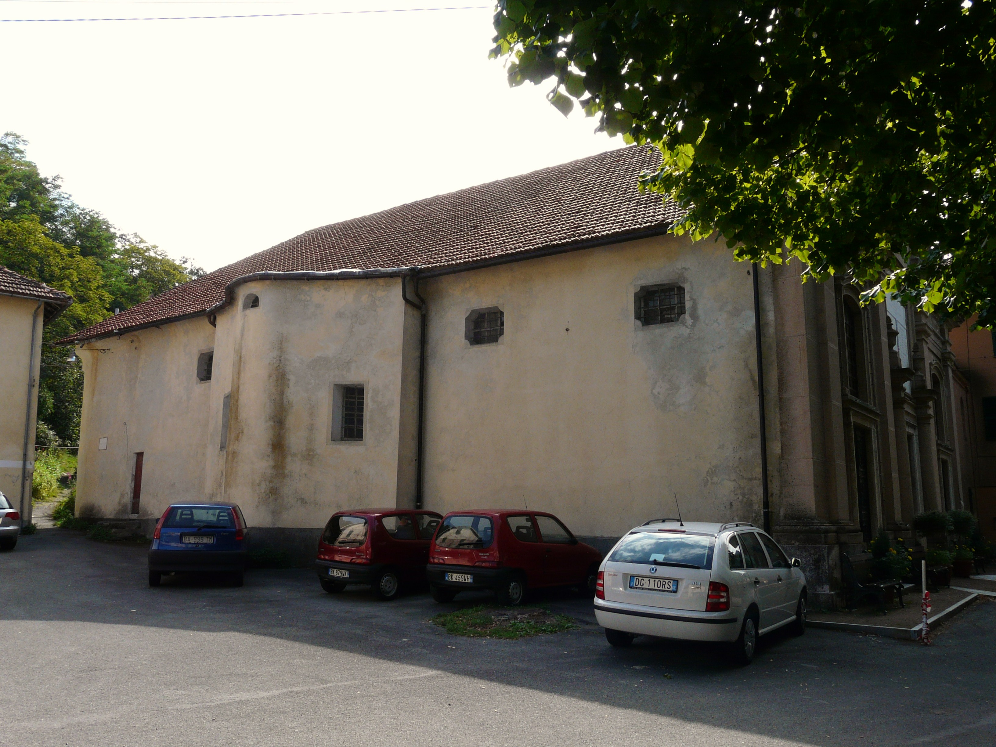 Complesso laterale della chiesa di San Giacomo a Martina d'Olba, Urbe, Liguria, Italia